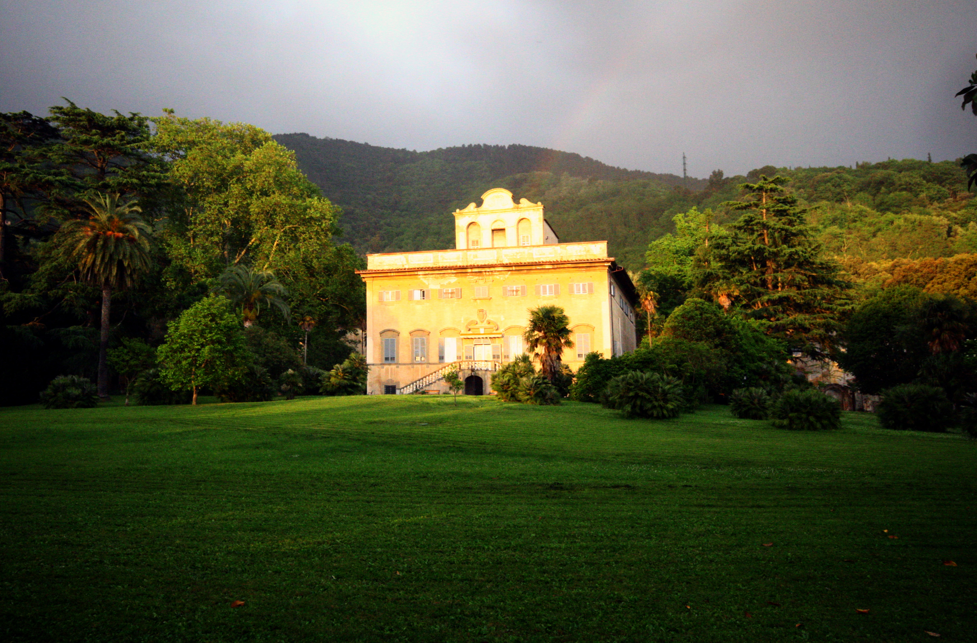 Villa di Corliano con arcobaleno, San Giuliano Terme (PI) - A.Agostini (autorizzato da Herbert Zippel), maggio 2010.